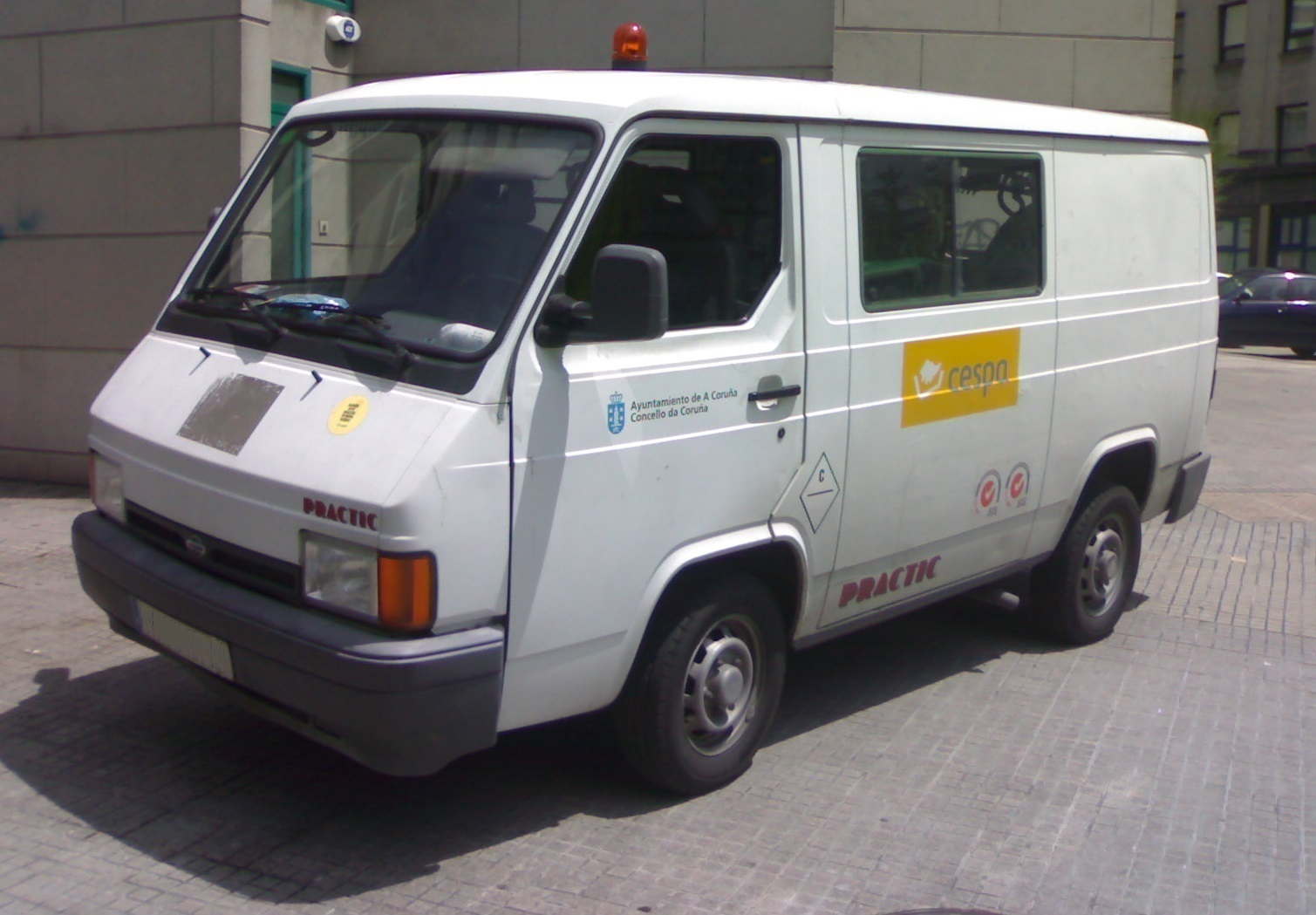 Una furgoneta Nissan Trade Practic.